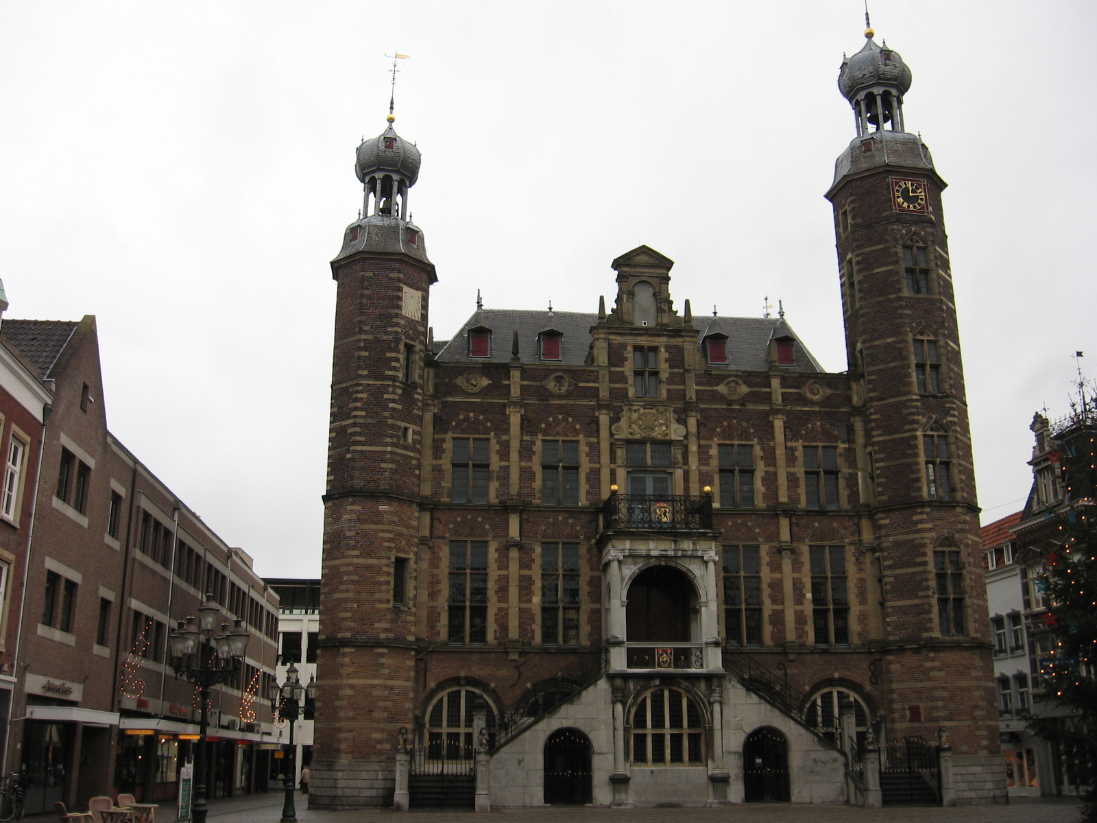 Zicht op een deel van het stadhuis van Venlo gevestigd aan de Markt 1 in het centrum van Venlo